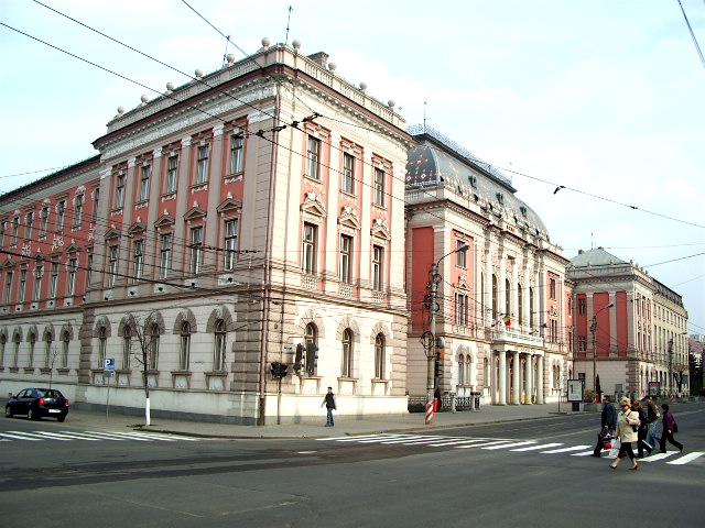 Cluj-Napoca: Palatul de Justiţie